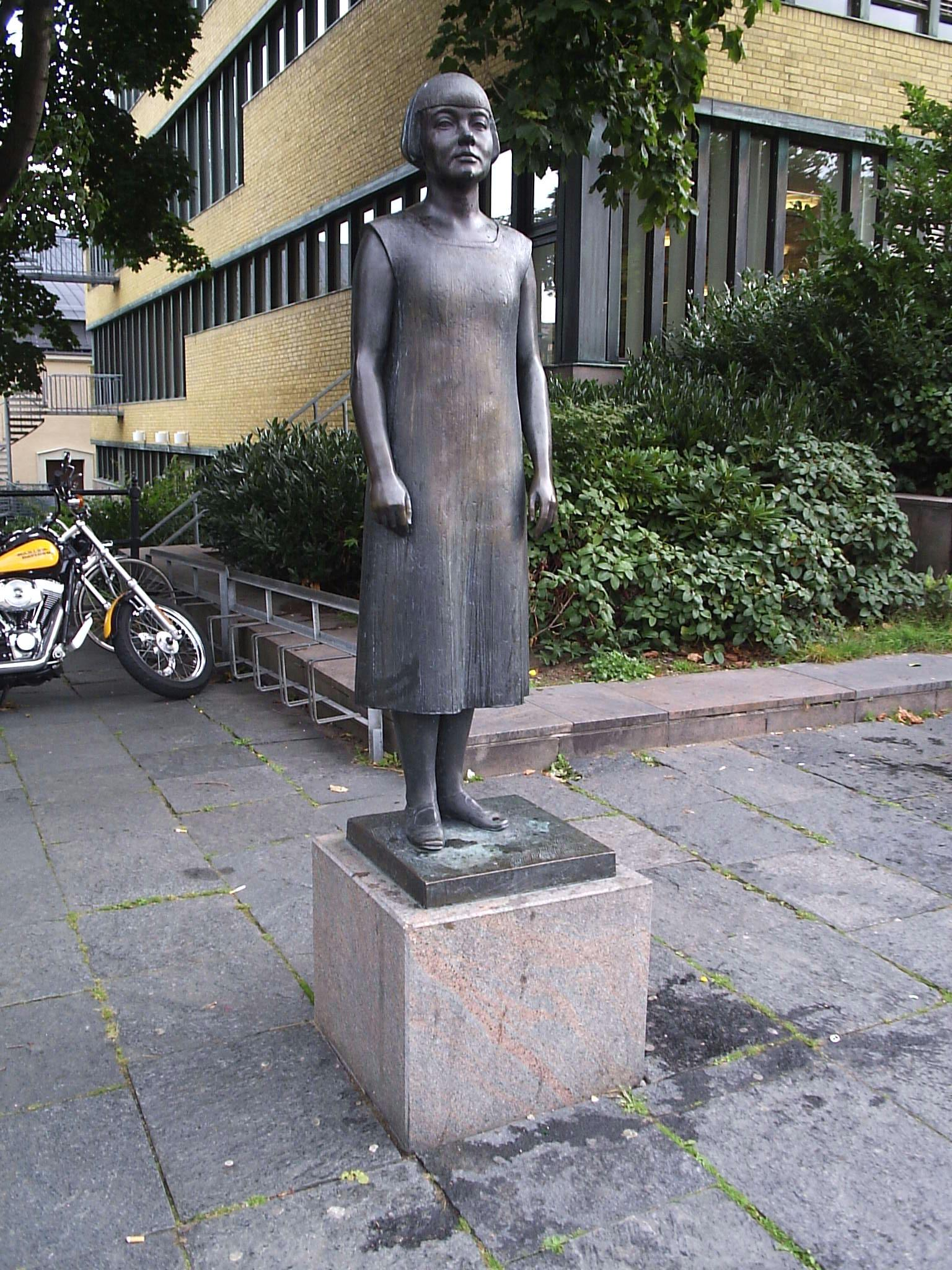 Karin Boye-statyn utanför Stadsbiblioteket i Göteborg. Fotograferad den 13 september 2005 av Harri Blomberg.